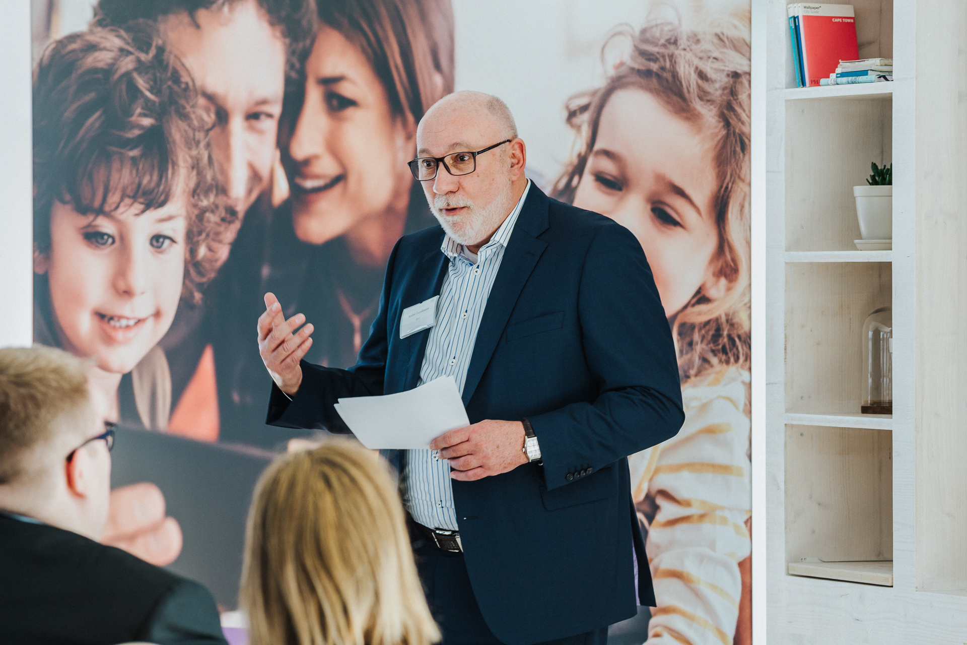 Walter Capellmann, Hauptbevollmächtigter DELA Deutschland beim DELA Opening Day Düsseldorf